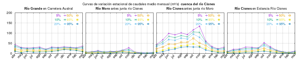 Curvas de variación estacional en la cuenca del río Cisnes.